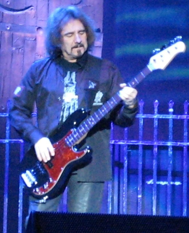 Geezer Butler, Heaven And Hell at the NEC, 2007-11-13.